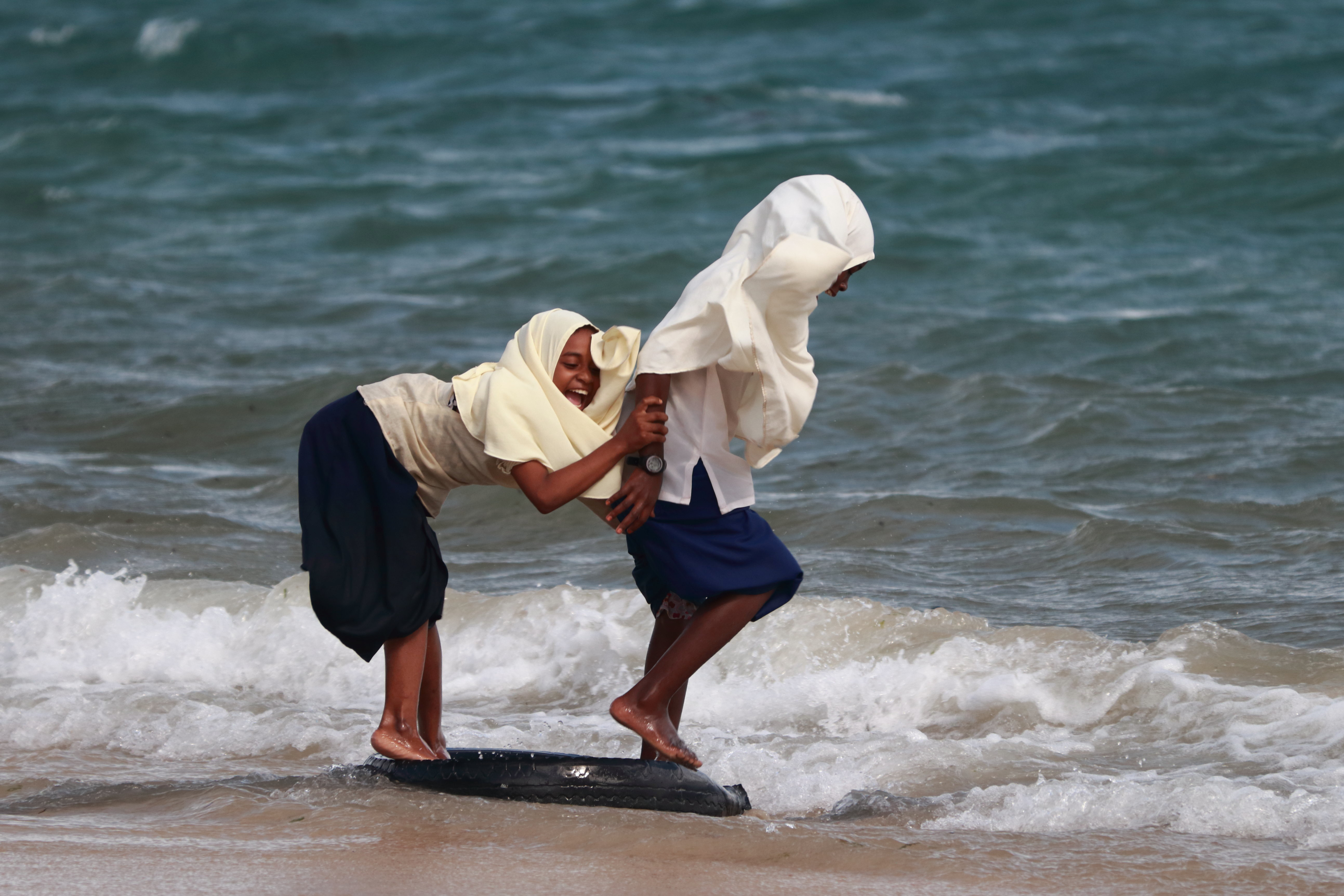 Pour ces jeunes filles le chemin de l'école passe par la plage de Stone Town, c'est l'occasion de prendre du bon temps entre amies. This is an image with the theme "Play" from: Tanzania